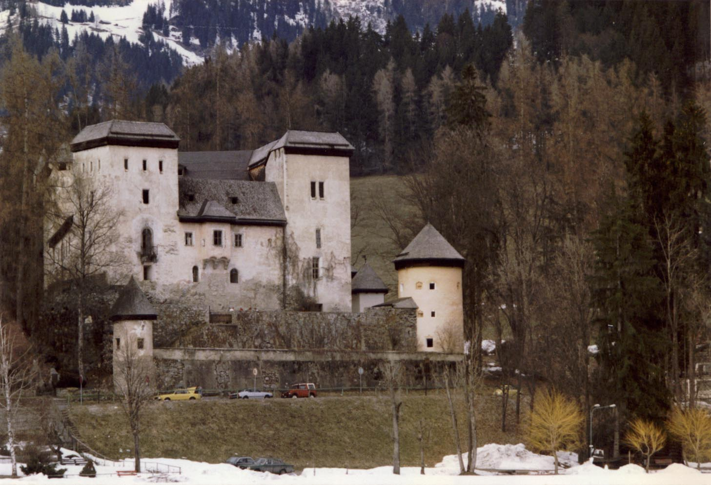 Schloss Goldegg, Südseite, selbst fotografiert, MacElch (Rainer Kunze), 1986